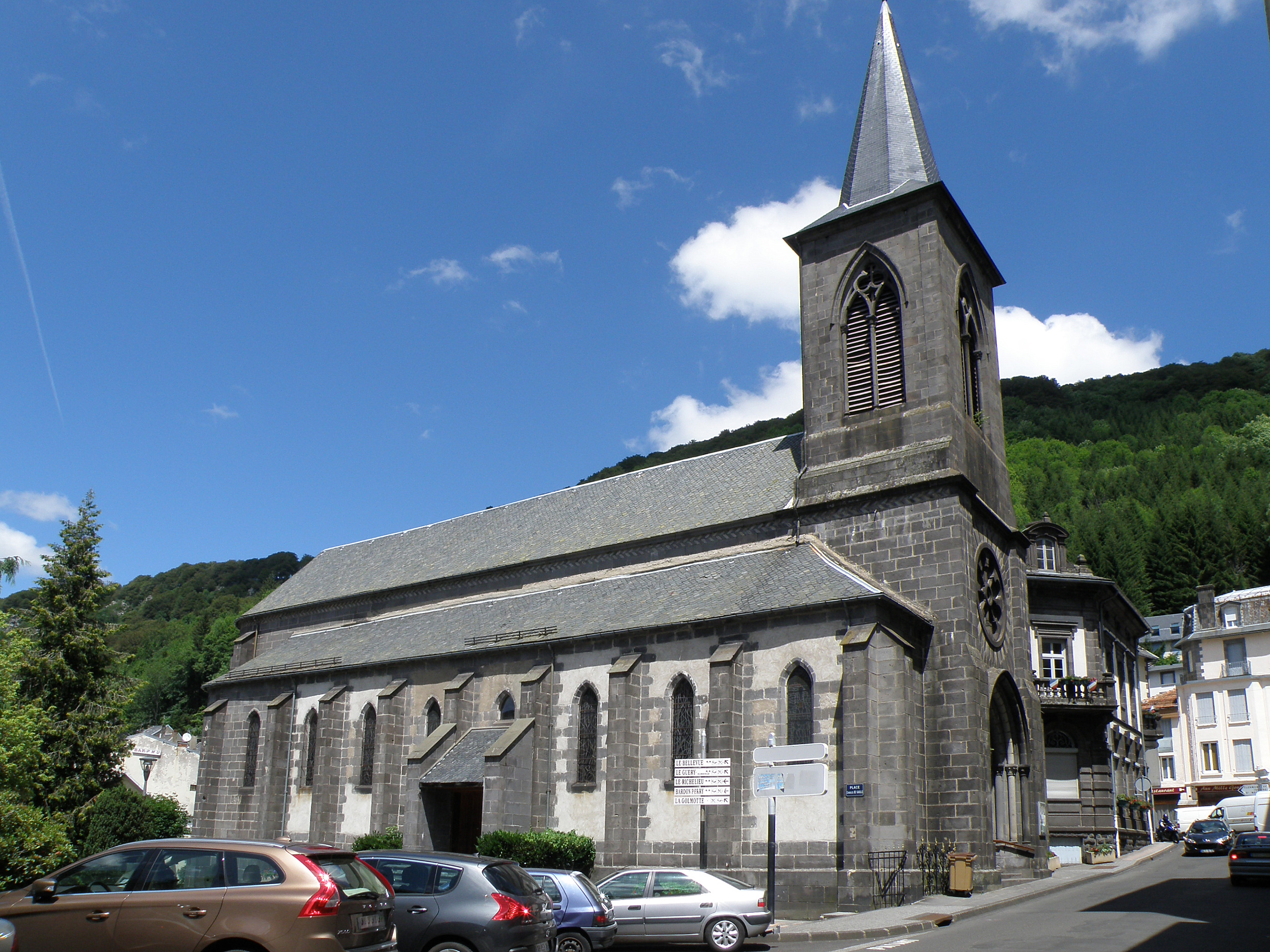 Le Mont-Dore, ville du Puy-de-Dôme (France, région Auvergne). Église paroissiale néo-gothique Saint-Pardoux (XIXe siècle).